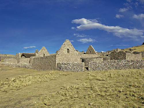 Es la vista de las Ruinas de Kanamarca